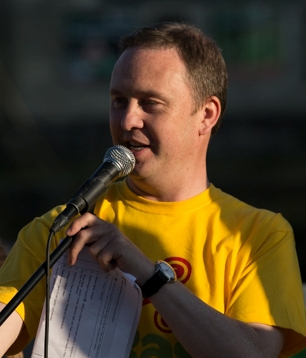 Siôn Jobbins yn annerch torf yn ystod Ras yr Iaith 2014